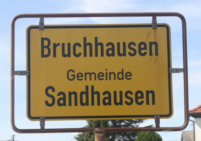 Ortsschild von Bruchhausen, September 2018